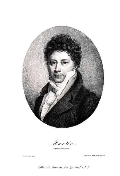 Portrait de Jean-Blaise Martin, musicien et chanteur lyrique (1768-1837), paru dans Le Courrier des spectacles.